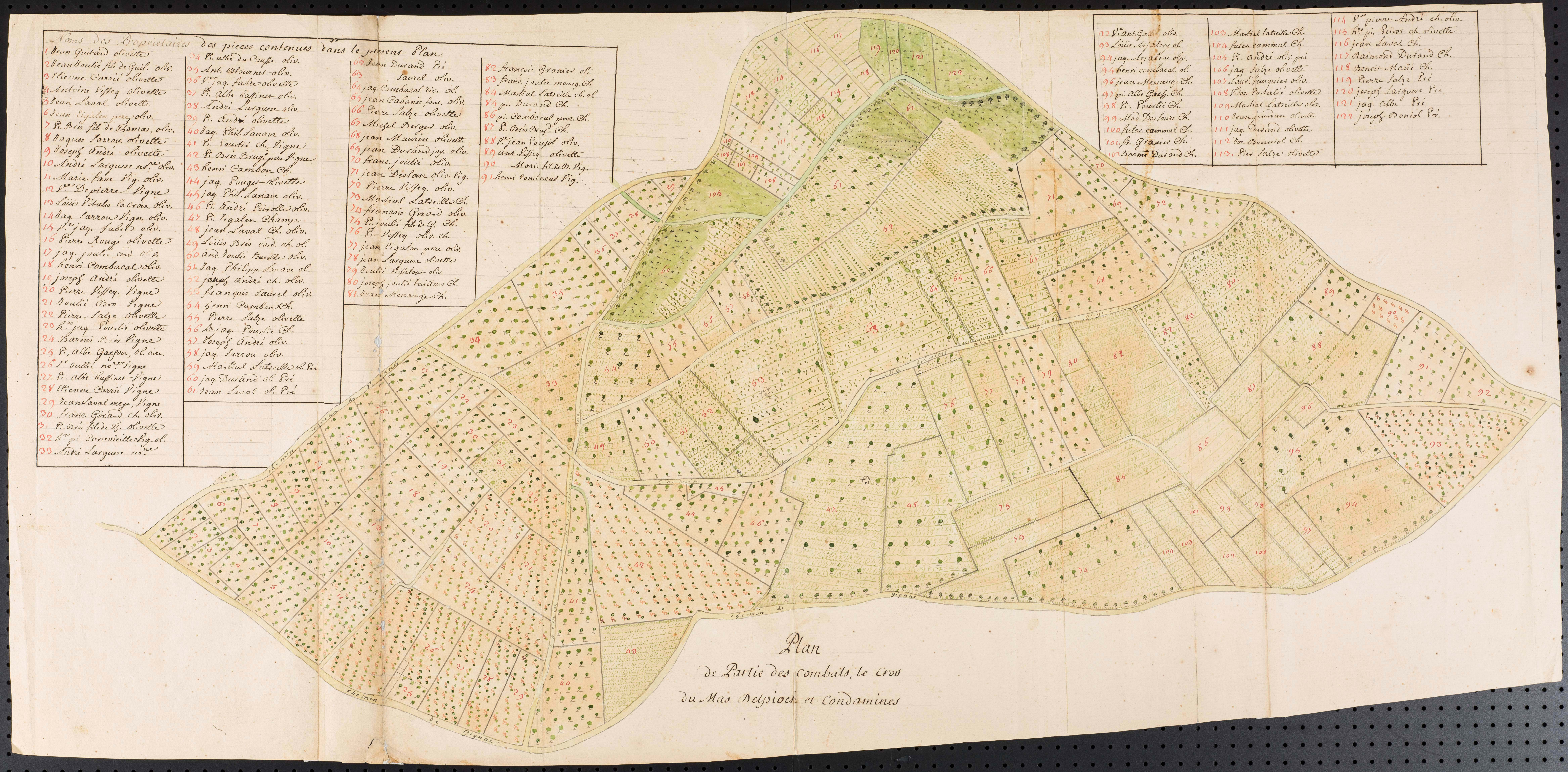 Saint-Jean-de-Fos. - Arpentement général du terroir et de la commune : plan aquarellé fait à la réquisition des pères bénédictins de l'abbaye de Saint-Guilhem-le-Désert, seigneurs fonciers dudit lieu, levés par Pierre Flory, géomètre à Lu